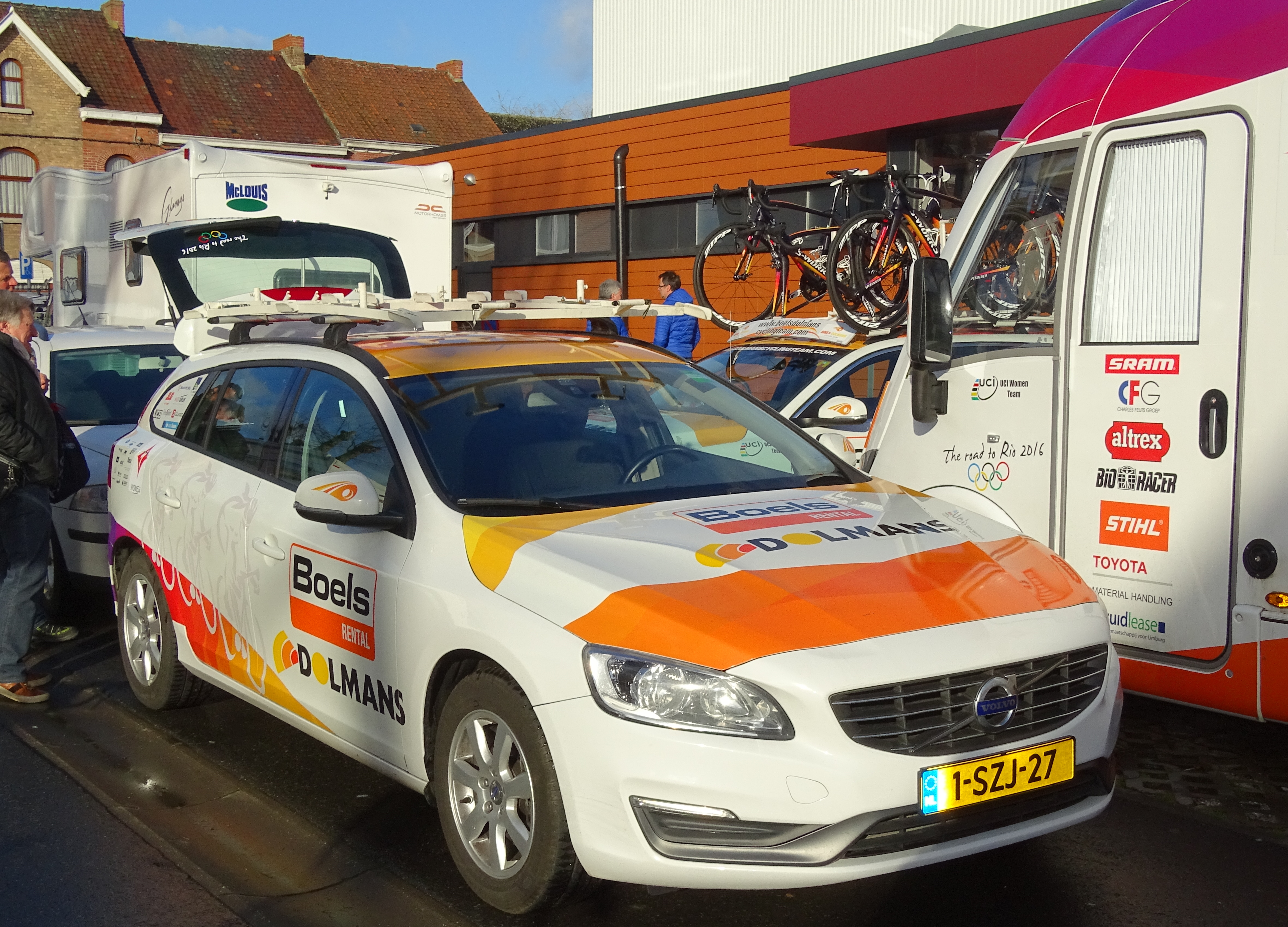 Reportage réalisé le mercredi 2 mars à l'occasion du départ du Samyn des Dames 2016 et du Samyn 2016 à Quaregnon, Belgique.